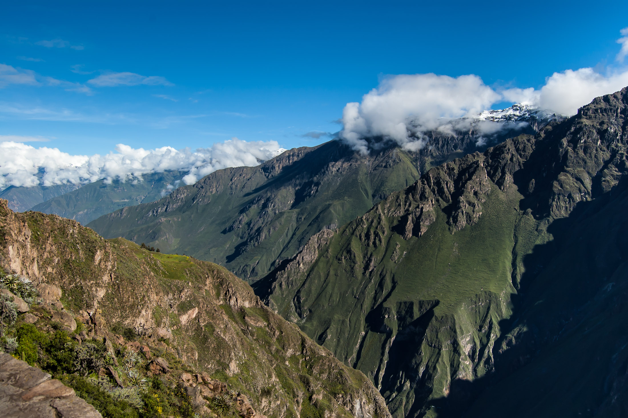 Vista del Cañon del Colca en Arequipa, Perú